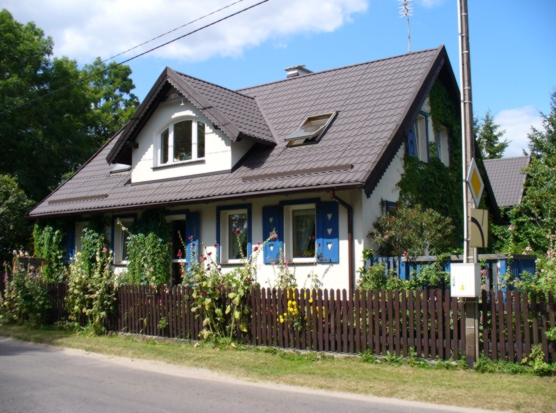 Pieczonki